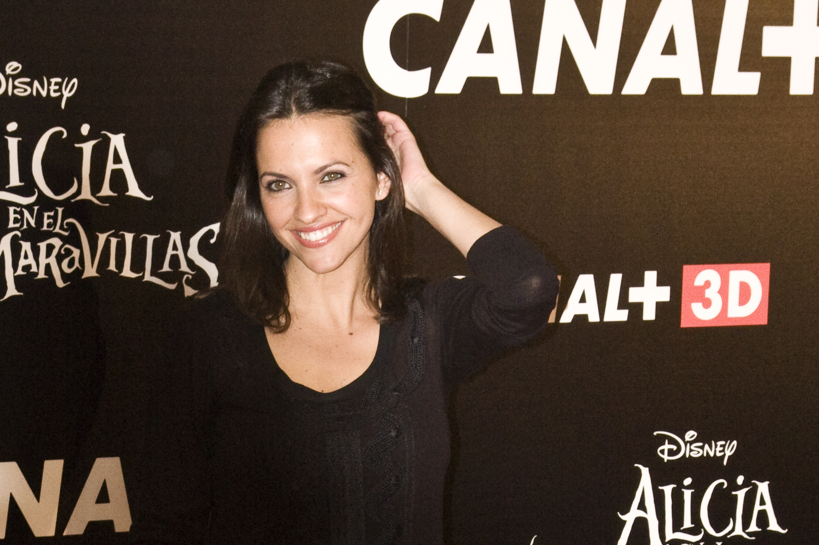 Ana Ruiz, actriz y presentadora española, en 2010.